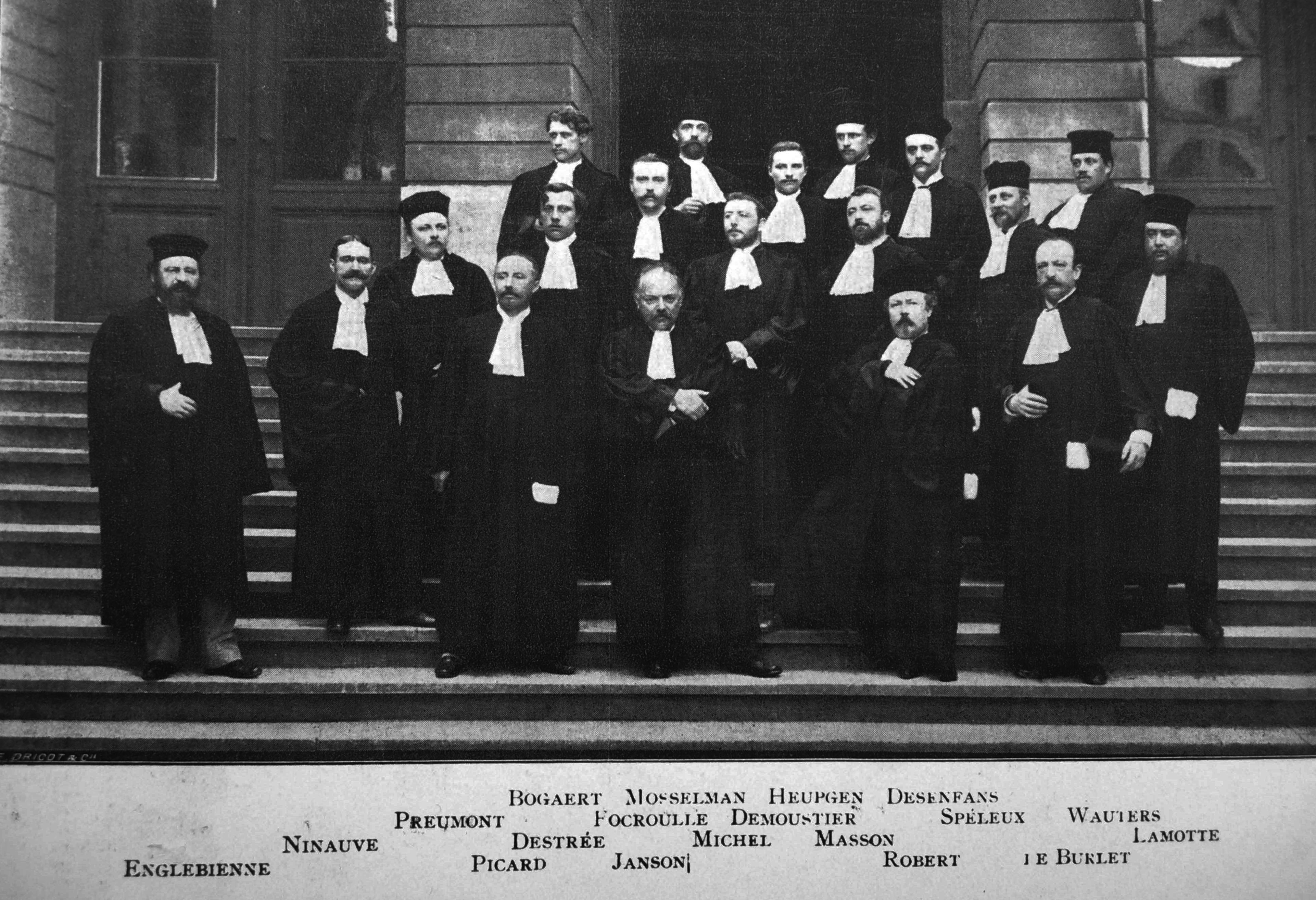 Les défenseurs du procès du grand complot (mai 1889)